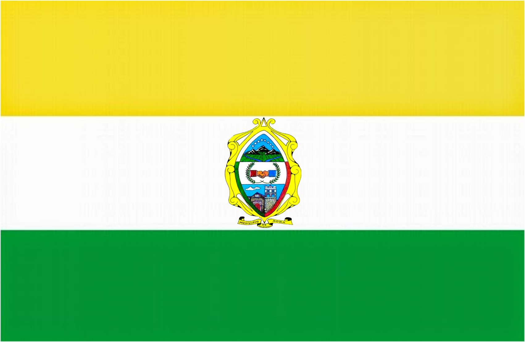 Bandera de Sora Boyacá